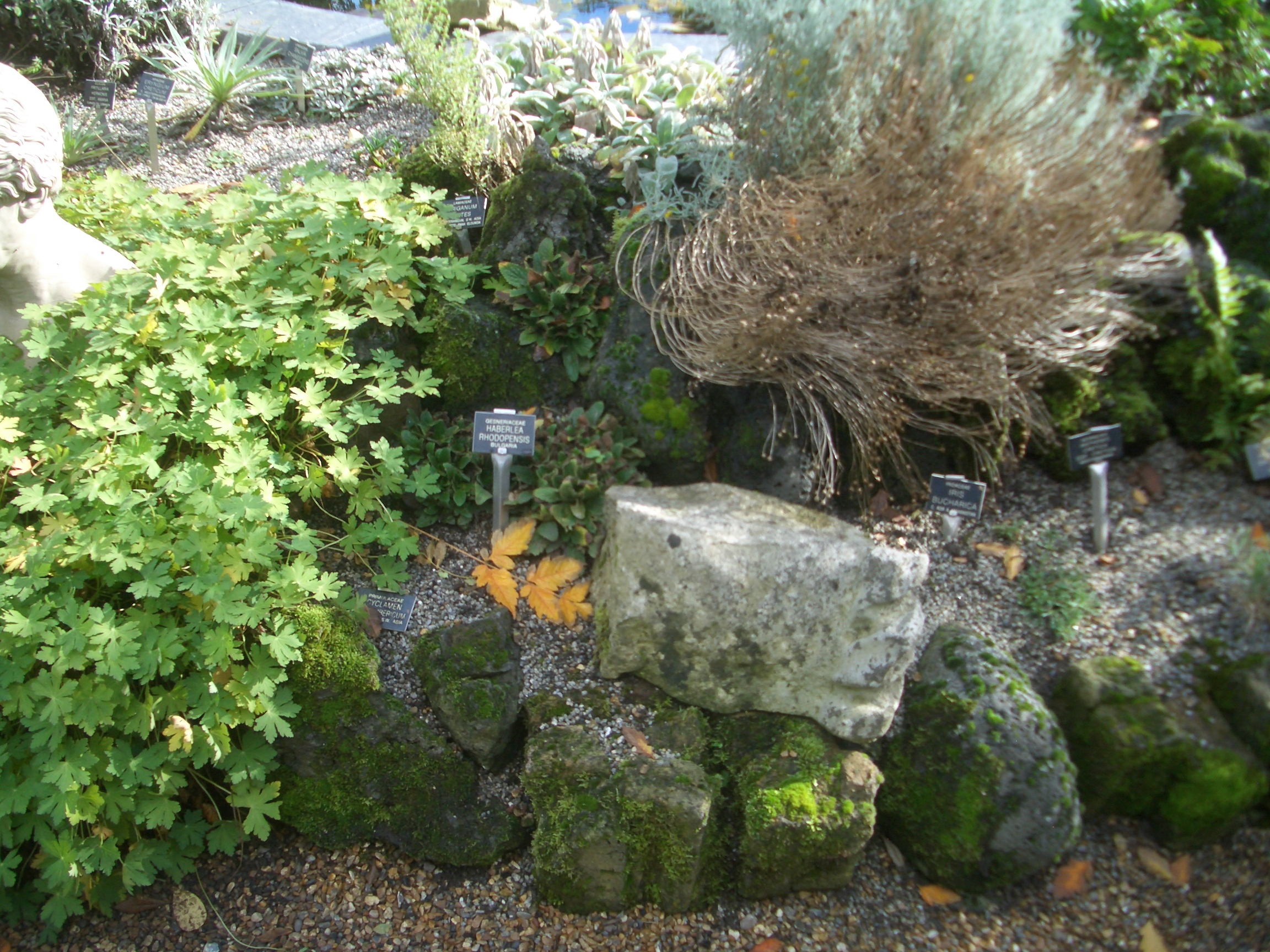 Steingarten im Chelsea Physics Garden